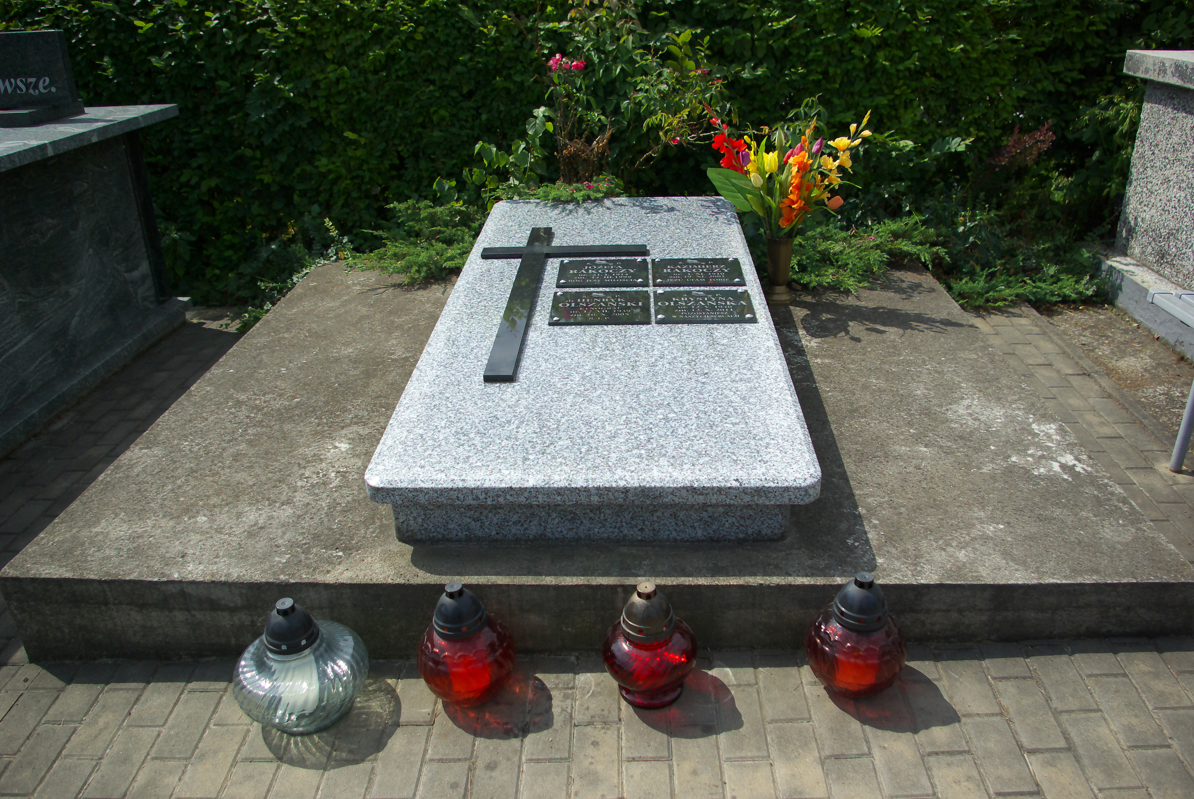 Grobowiec rodziny Olszański i Rakoczy na Cmentarzu Centralnym w Sanoku